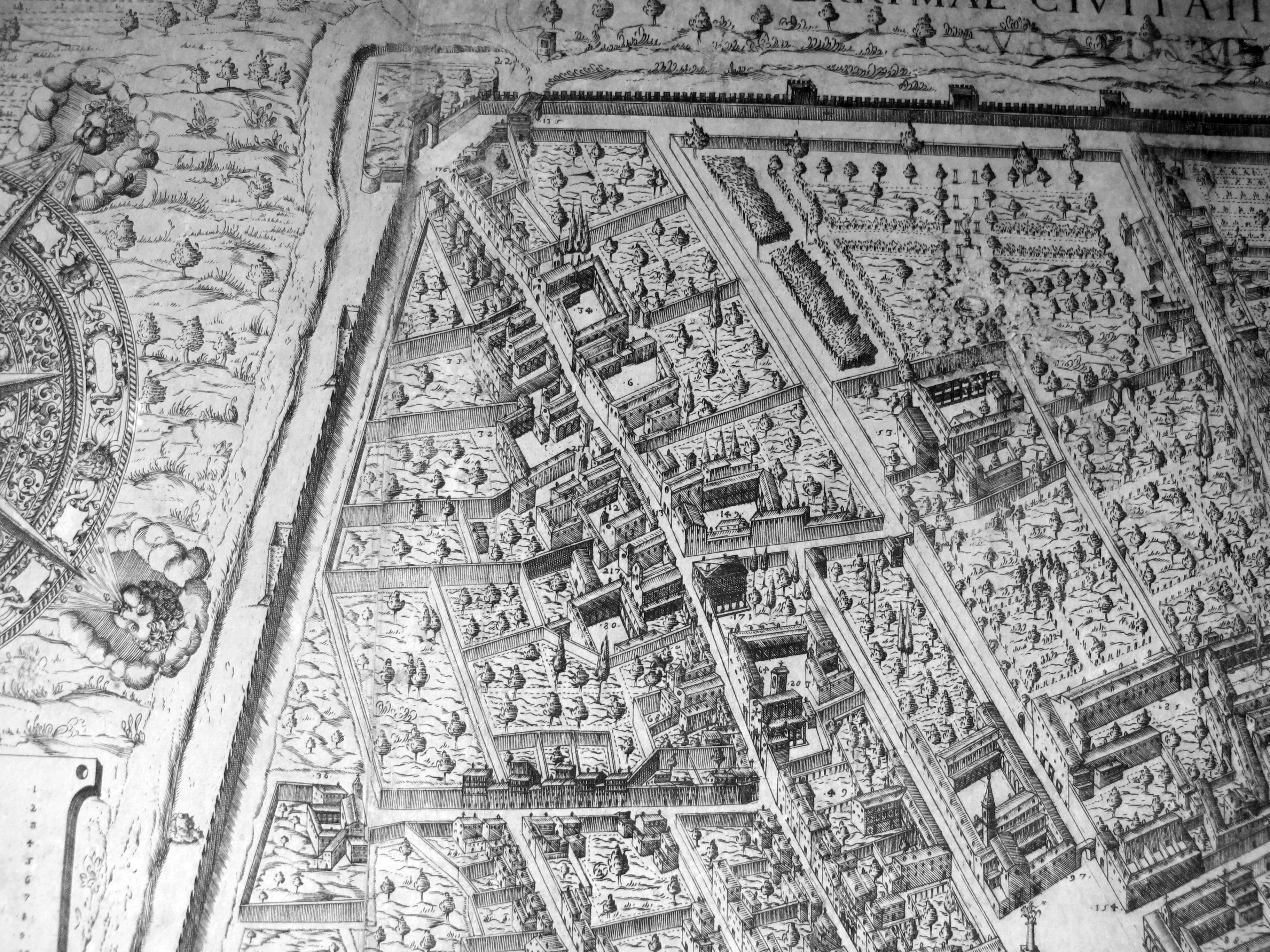 Pianta